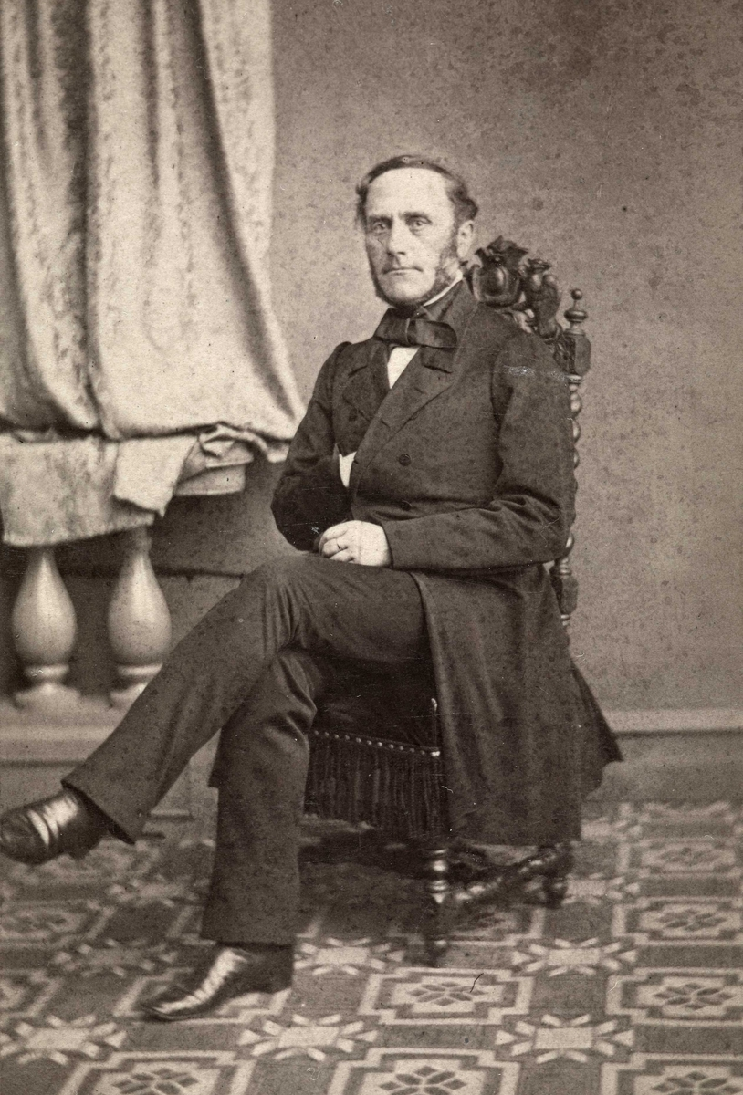 Wolfgang Wenzel Haffner, portrett, mann, privatlærer, marineoffiser, statsråd, sittende helfigur, napoleonspositur. Haffner tjenestegjorde i marinen fra 1824 til 1839, hvoretter han ble kronprins Oscars (den senere kong Oscar IIs) og hans søskens privatlærer i 9 år. Fra 1848 til 1861 fortsatte Haffner sin militære karriere, og ble kommandør. Han var deretter marineminister fra 1861 til 1869, i Frederik Stangs regjering. Han trakk seg fra embetet etter mistillit fra Stortinget. Haffner var den første norske statsråden som har trukket seg på grunn av et mistillitsvotum. I forbindelse med overgangen mellom regjeringen Selmer og regjeringen Schweigaard i 1884 var Haffner konstituert som Norges statsminister i Stockholm fra 21. mars til 3. april 1884.